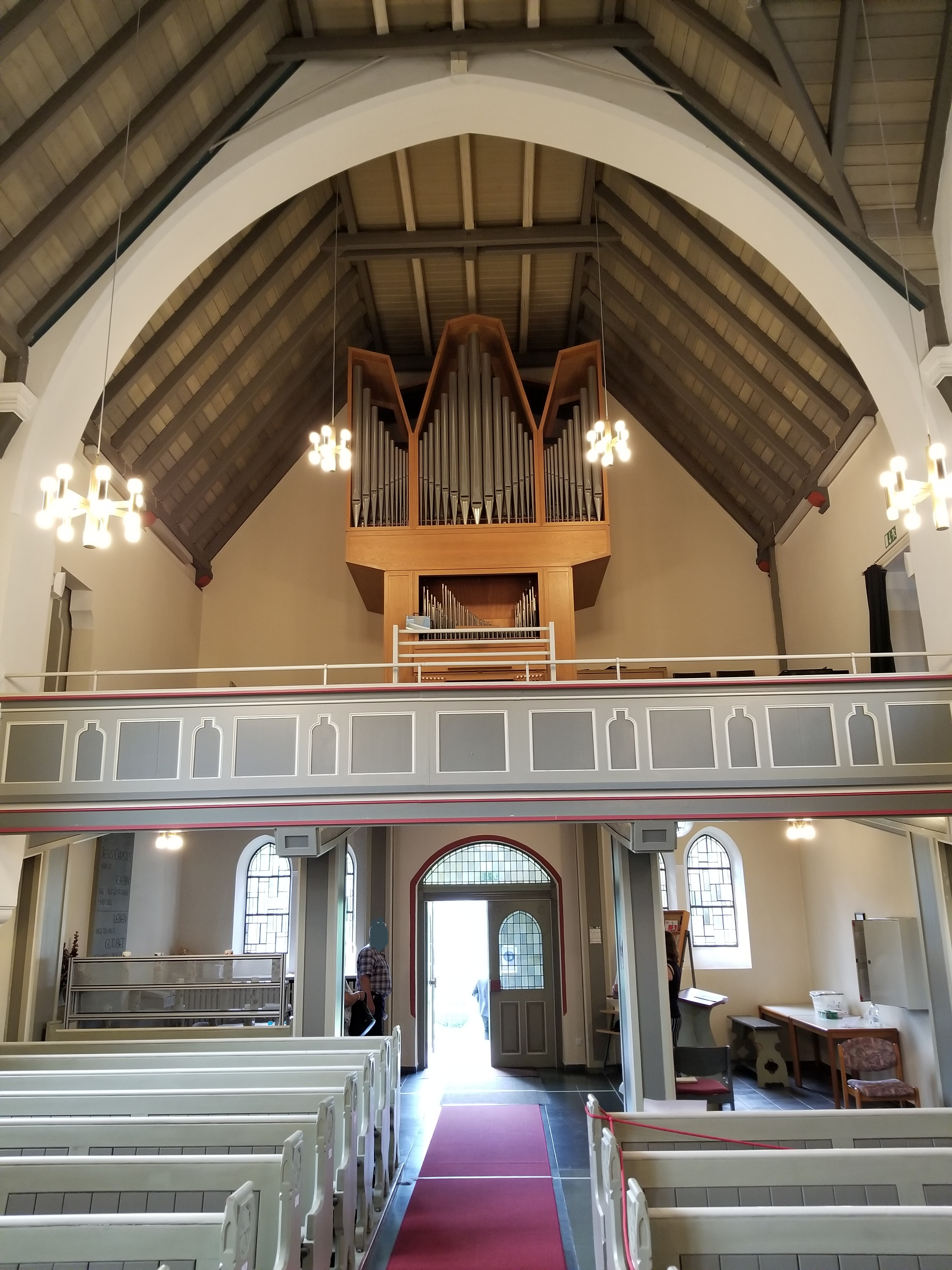 Eingang, Empore, Orgel und Holzdecke der evangelischen Kirche in Nachrodt, Blick vom Altarraum